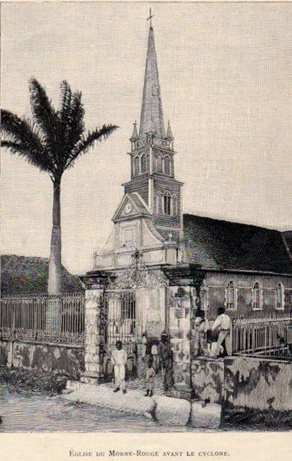 Vue de l'église Notre-Dame de la Délivrande du Morne-Rouge en 1890